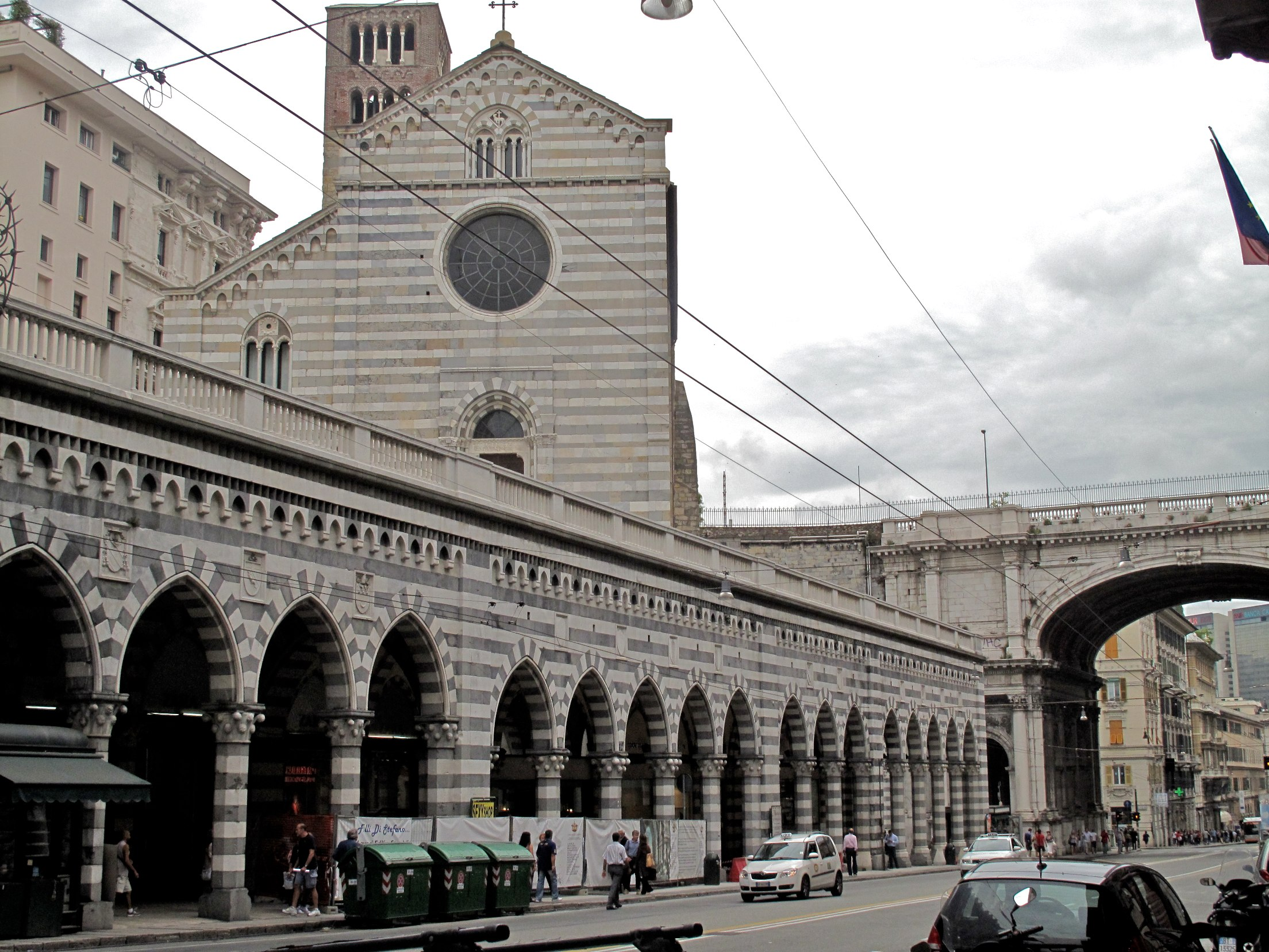 Vacances juillet 2011 en Ligurie